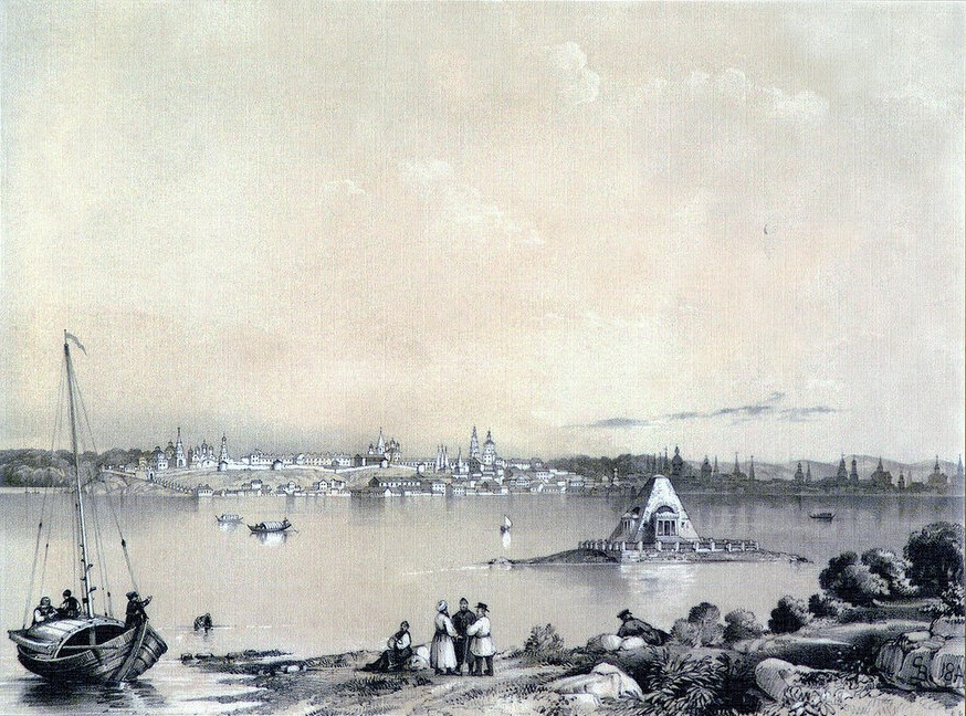 Вид всей Казани во время разлива. Из альбома: Виды Казани, рисованные с натуры Эдвардом Турнерелли. - Лондон, 1839.